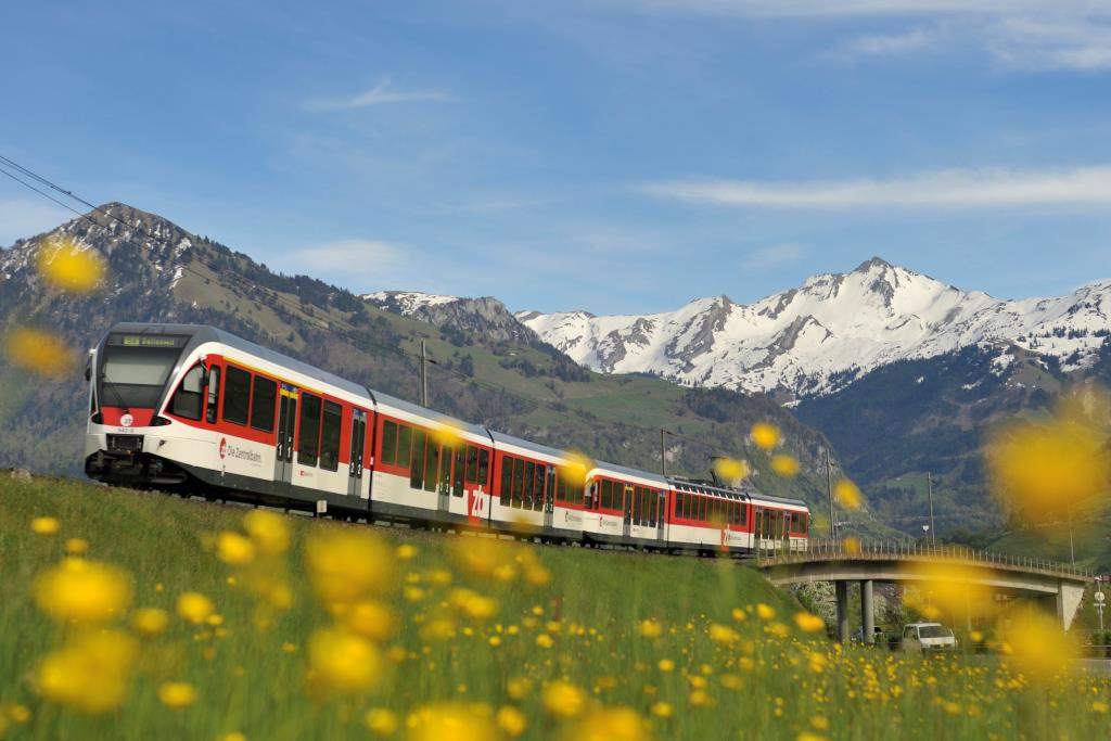 SPATZ